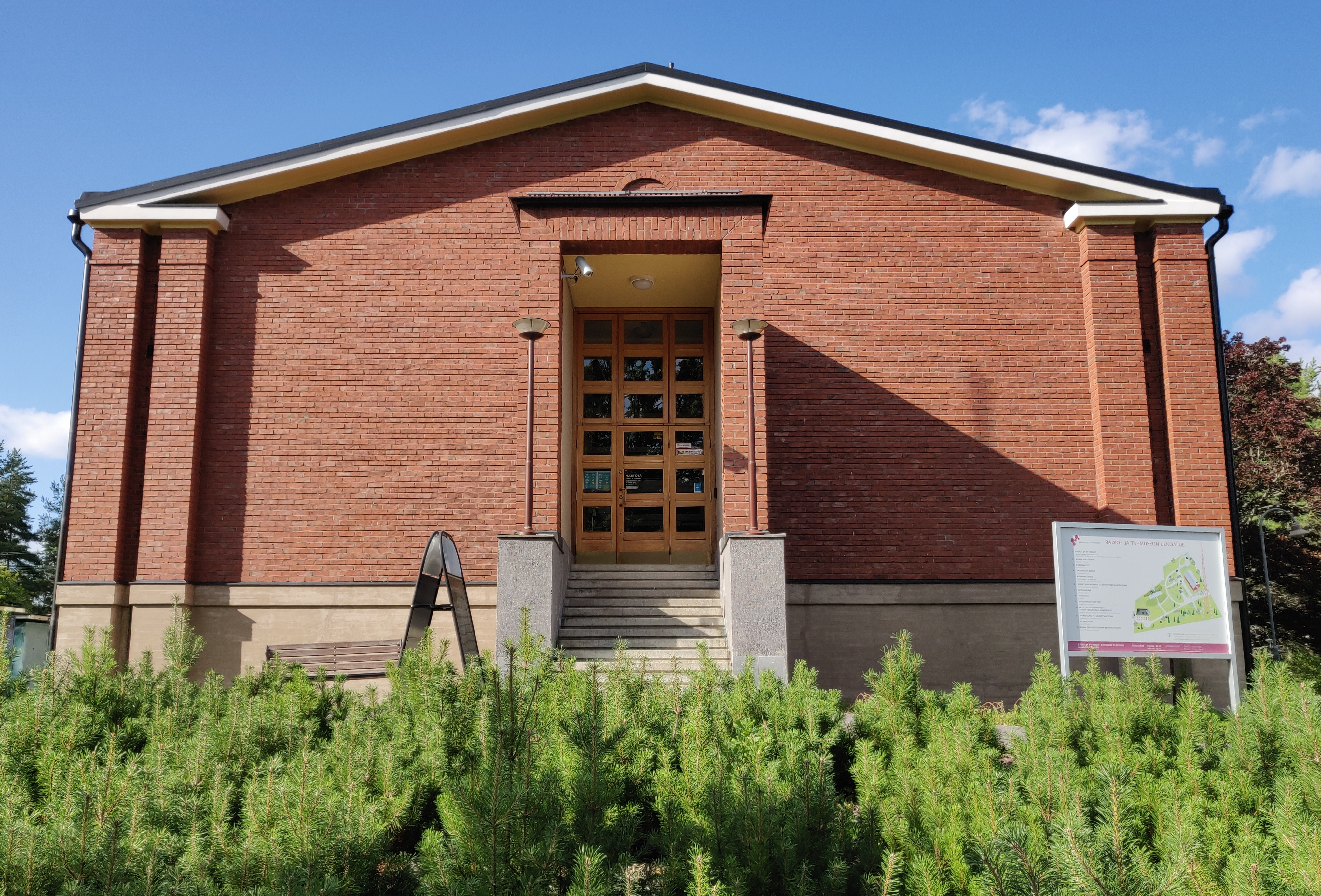 Radio- ja TV-museo Mastola Lahden Radiomäellä.